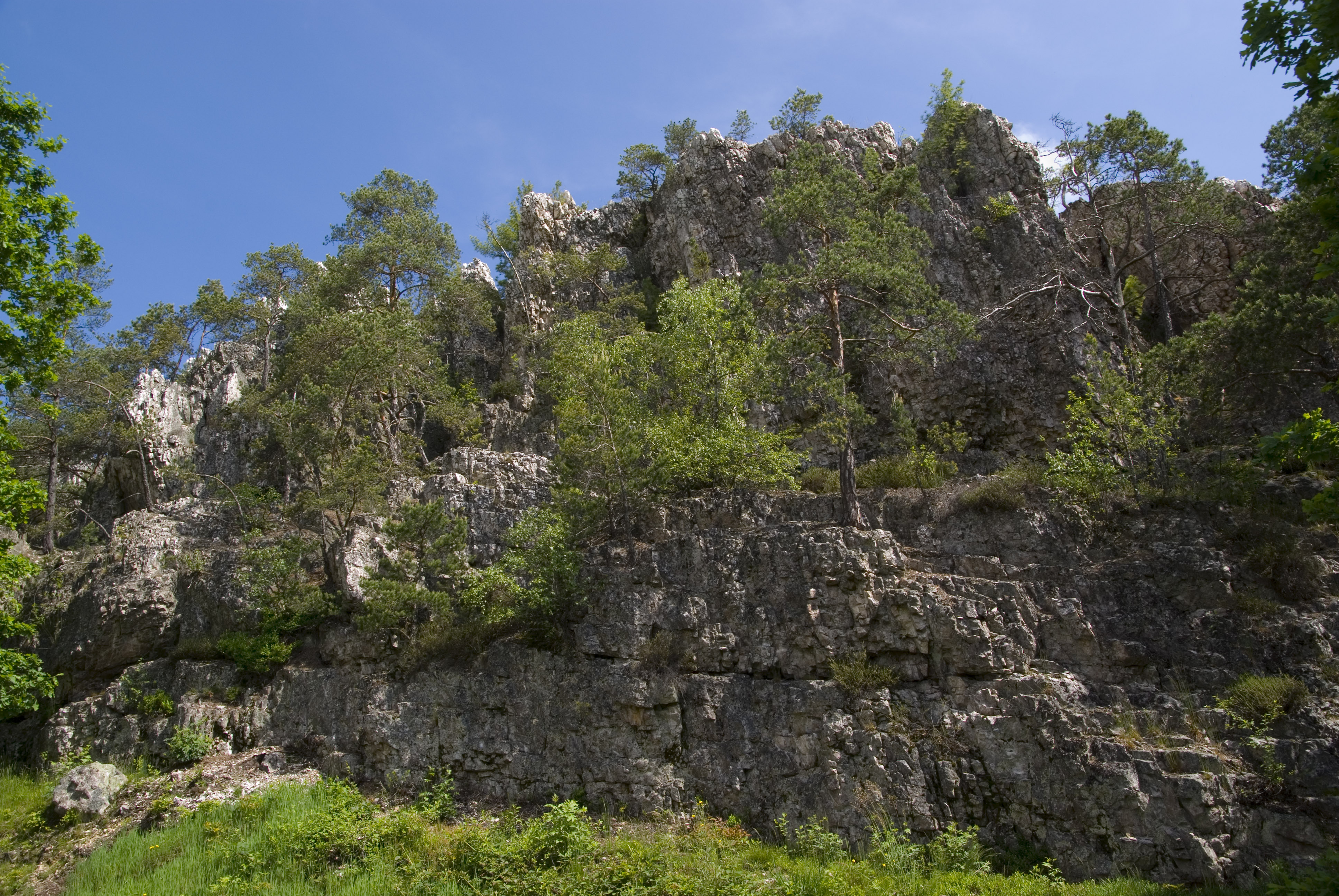 Großer Pfahl bei Viechtach, Bayerischer Wald